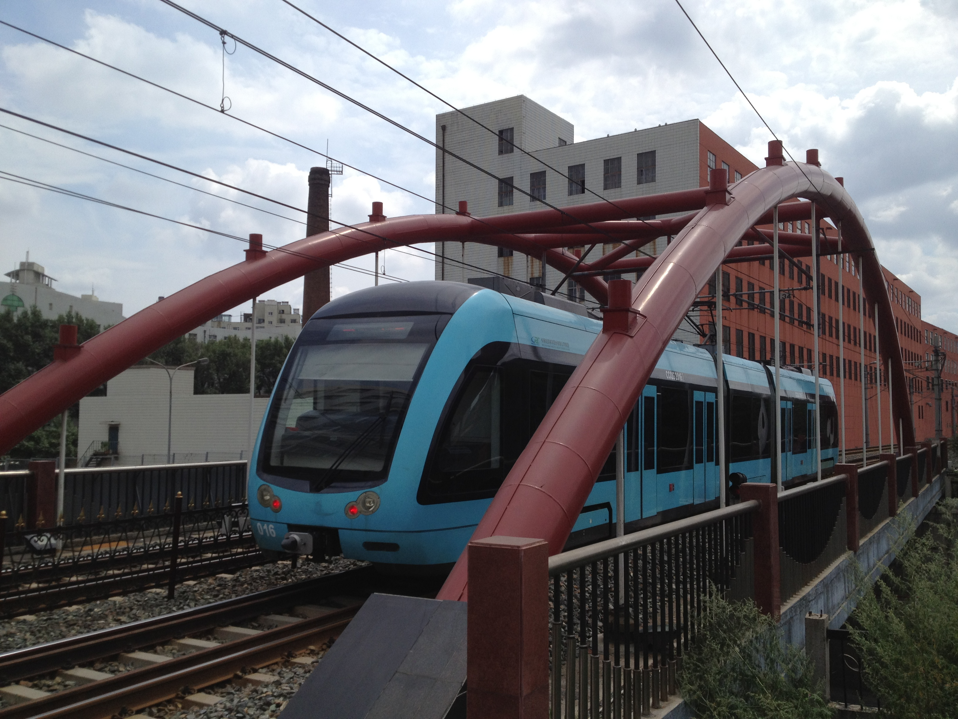 长春轻轨3号线